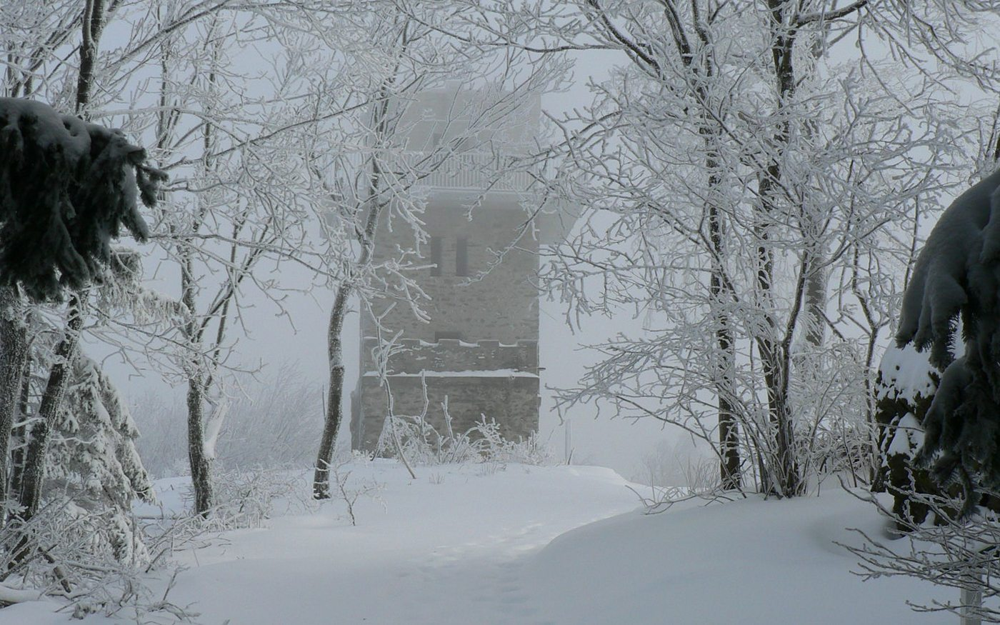 WRITTEN-STONE PEAK AT KŐSZEG (Irottkő-Geschriebenstein)